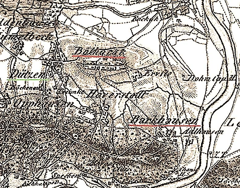 Бёльхорст. Часть топографической карты